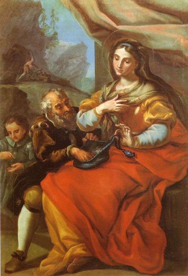 "Hemma und die Legende vom gerechten Lohn", Öl auf Leinwand/Oil on canvas, H 151 x B 110 cm